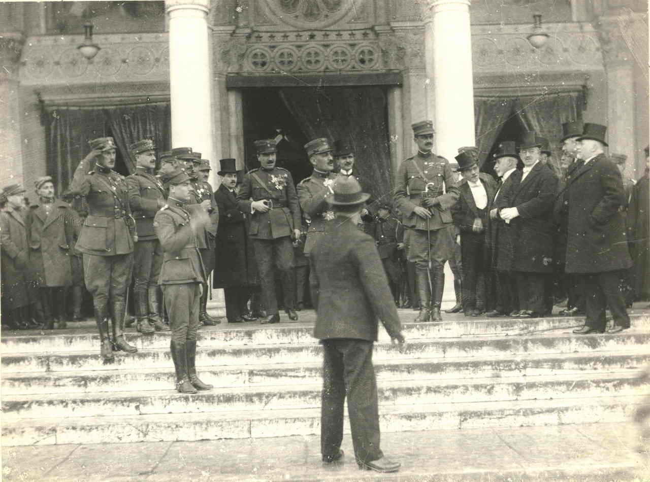 Ο Αρχηγός της επαναστάσεως του 1922 Νικ. Πλαστήρας με τον Πρωθυπουργό Στυλ. Γονατά και τον τότε Συνταγματάρχη Λουκά Σακελαρόπουλο έξω από την Μητρόπολη.